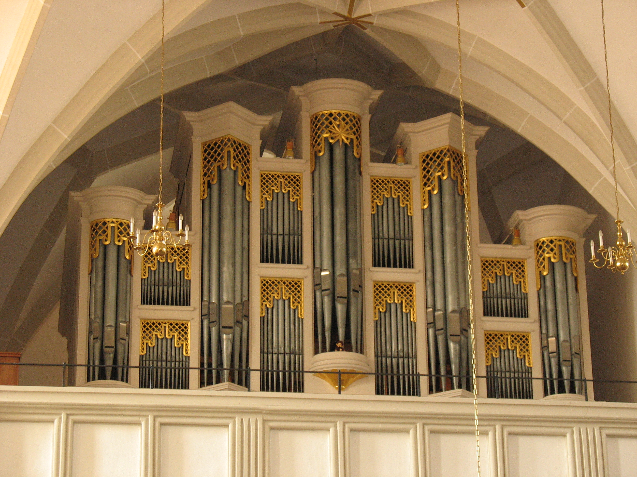 Plauen, St. Johanniskirche: Die Orgel von der Orgelbaufirma Jehmlich aus Dresden